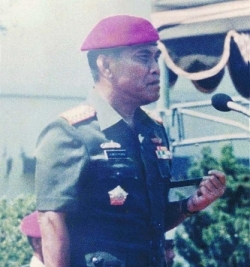 LB Moerdani, former commander-in-chief of Indonesian Armed Forces.